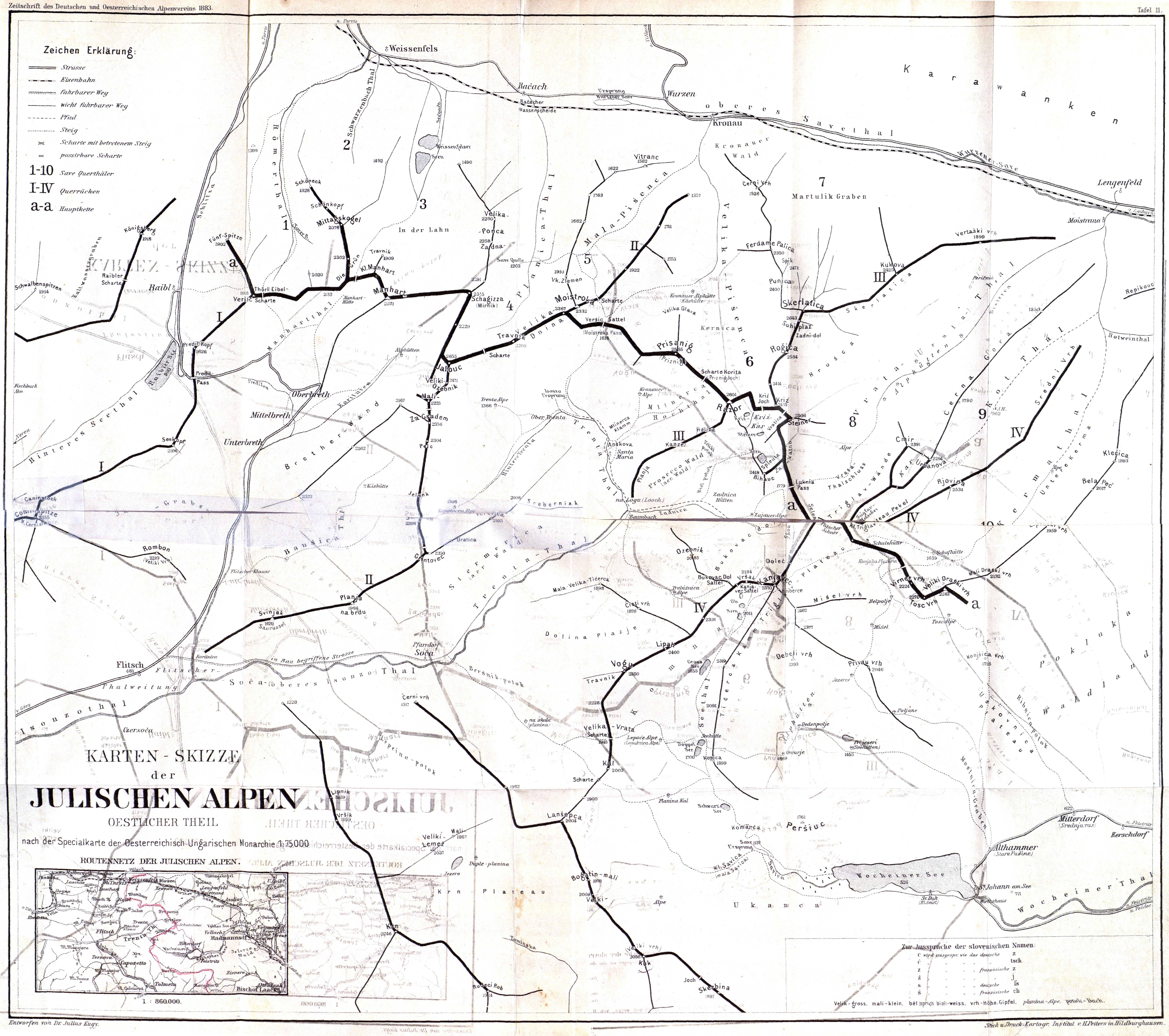 Karten-Skizze der Julischen Alpen oestlicher Theil aus Zeitschrift des Deutschen und Oesterreichischen Alpenvereins 1883 Band 14